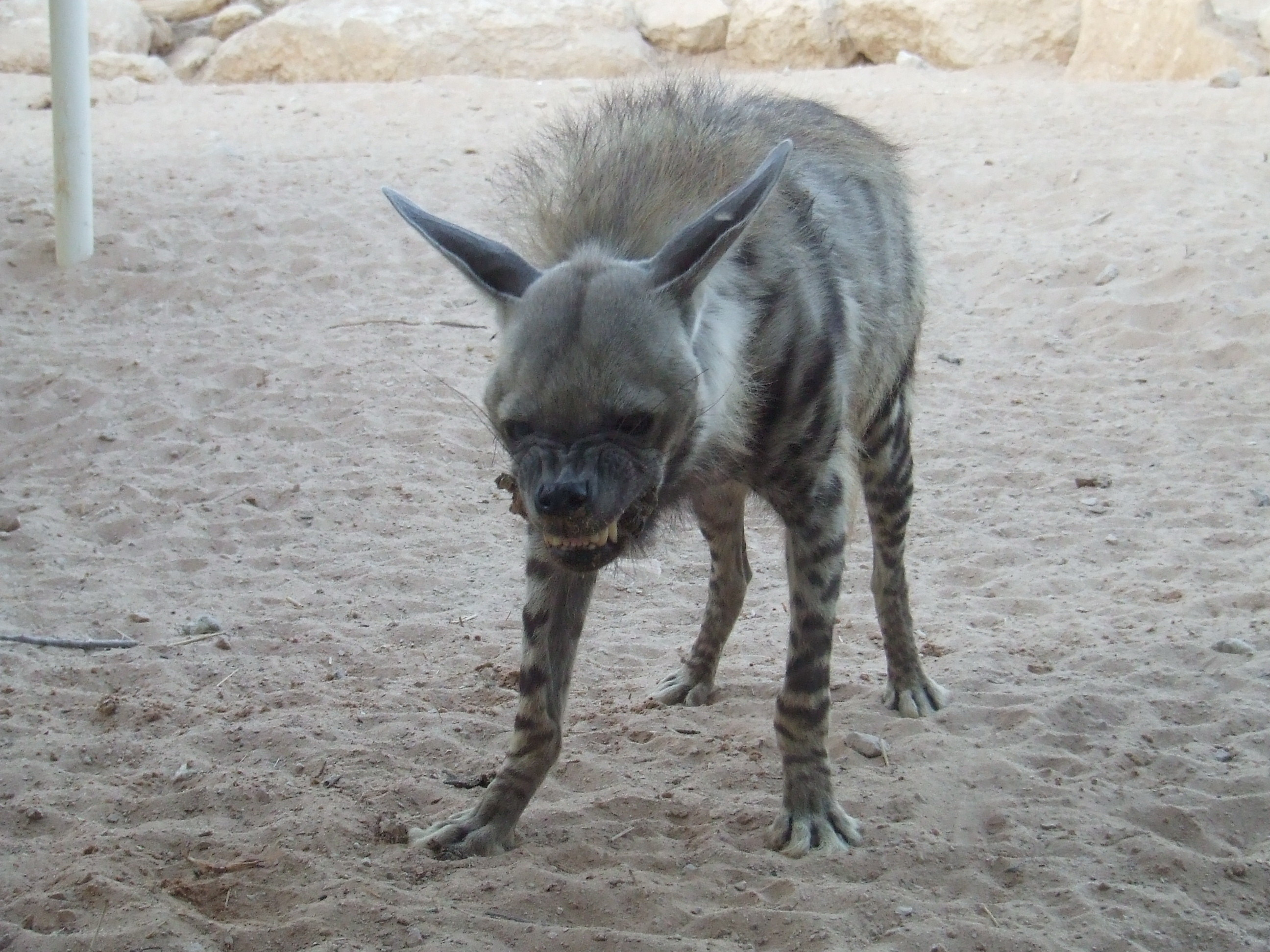 Hyaena hyaena